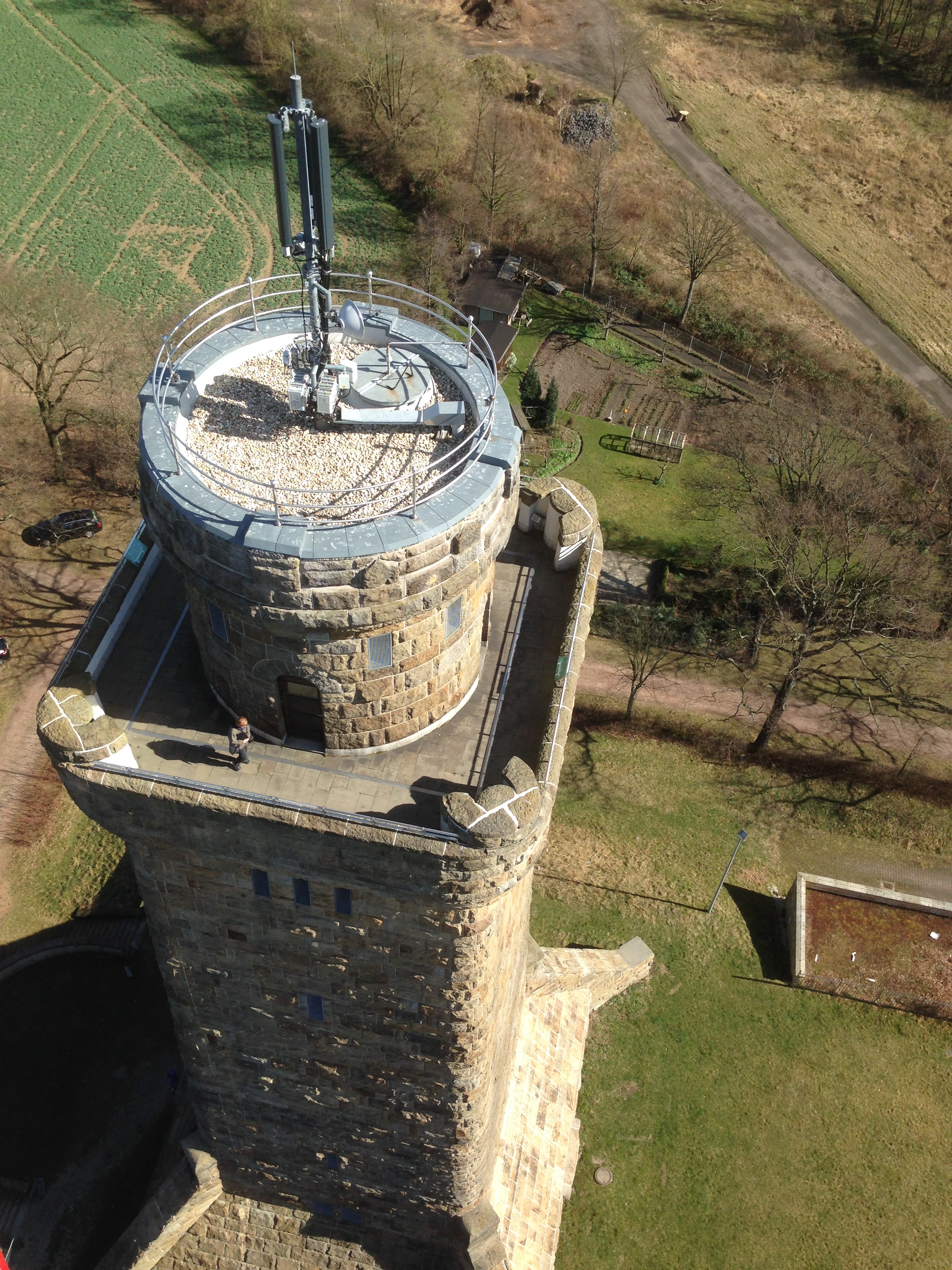 Bismarckturm (Glauchau) aus 60 m Höhe